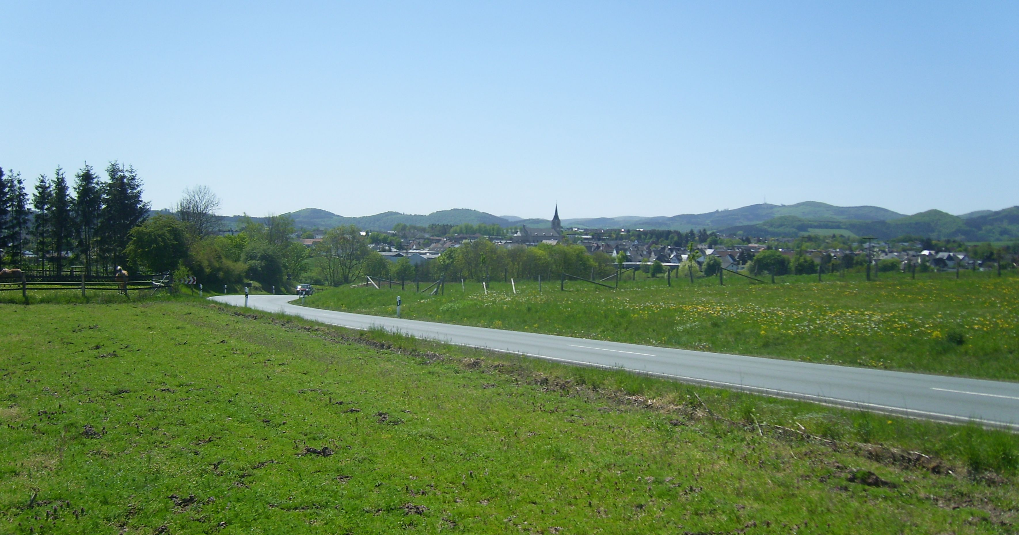 Die Medebacher Bucht mit den Randbergen Linsenberg (566,2 m, links), Stemmberg (572,2 m, halblinks) und Bollerberg (775,9 m, halbrechts bis rechts) nebst Teukelberg (749,2 m) und Verbrannter Seite (ca. 725 m); rechts schlösse sich Winterkasten (662,5 m) an. Im Vordergrund Medebach mit St. Peter und Paul.